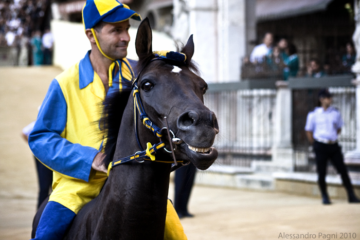 Foto del fantino Luigi Bruschelli detto Trecciolino e del cavallo Istriceddu.